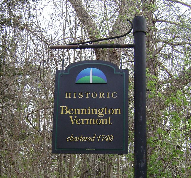 Les affiches pour le quartier de l'ancien Bennington